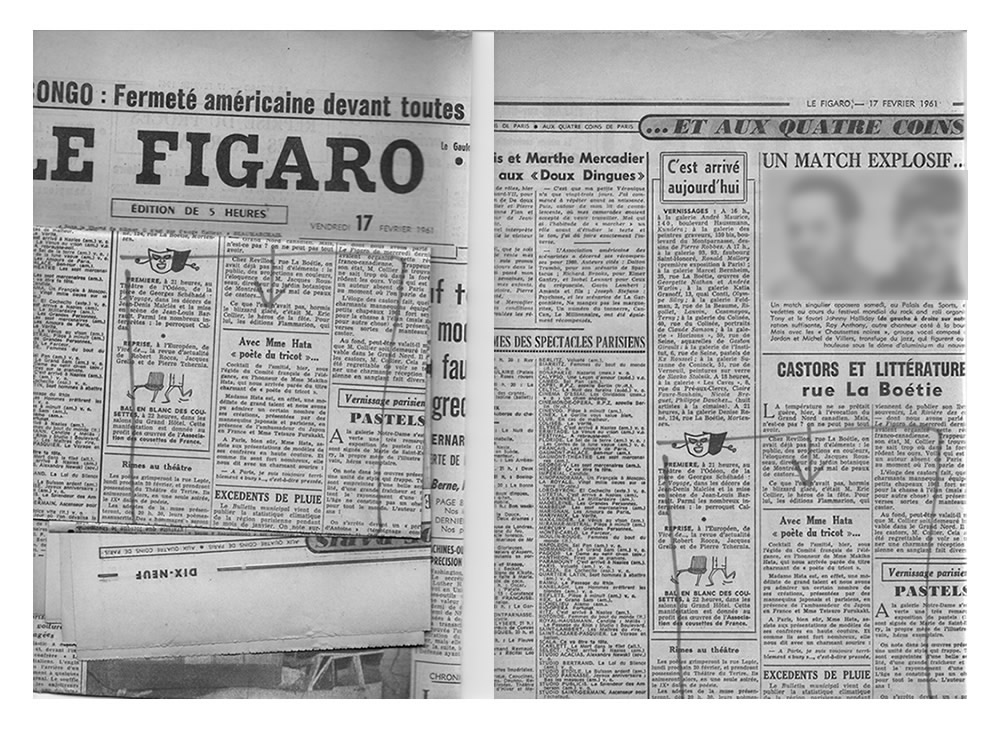 1961 秦万紀子コレクション掲載記事